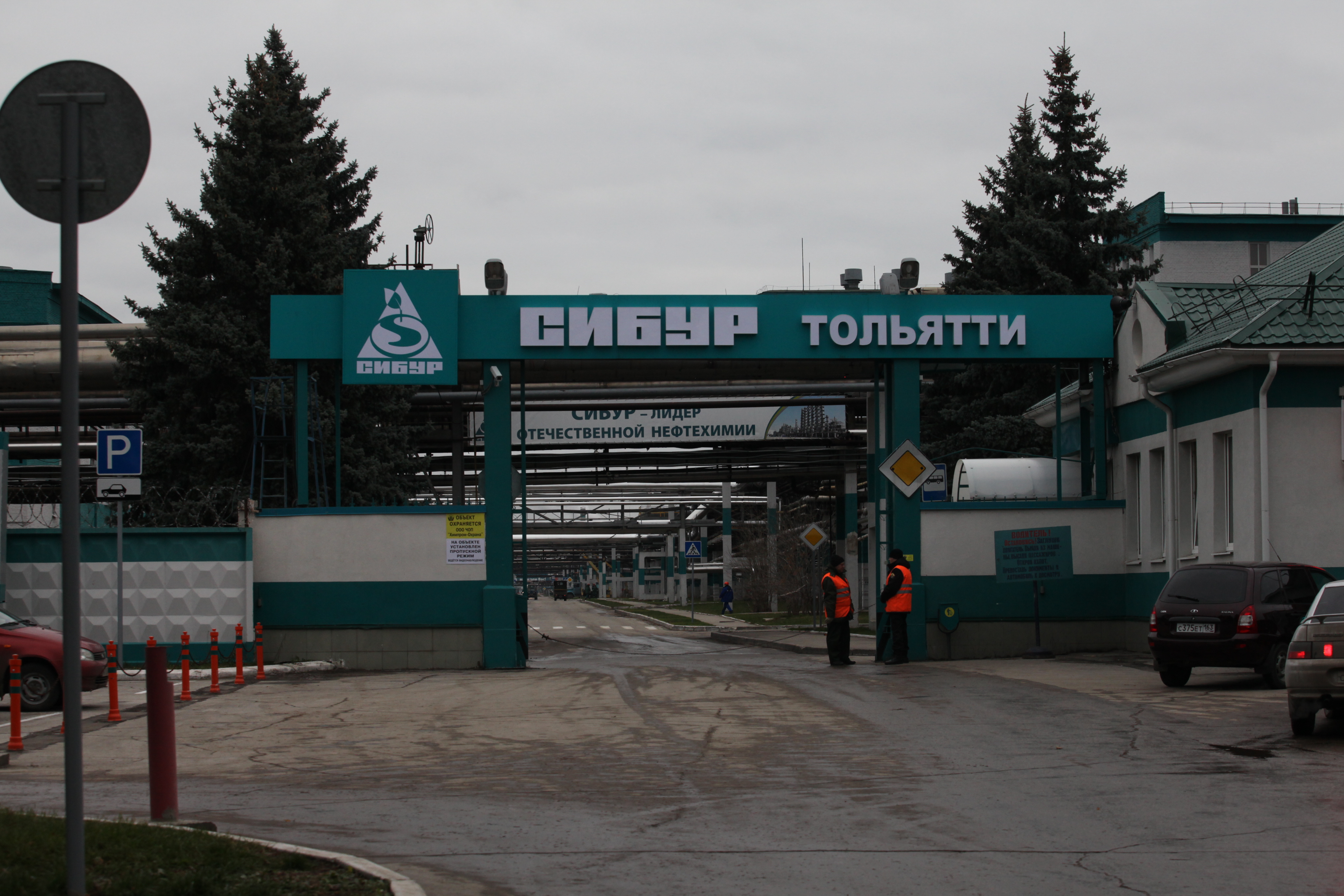 Обновлённая проходная завода "Тольяттикаучук", город Тольятти.